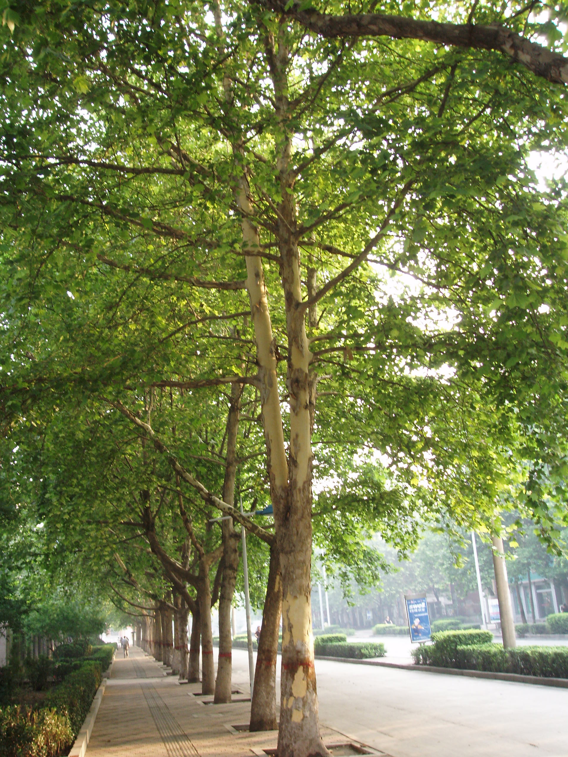 Platanus acerifolia trunk